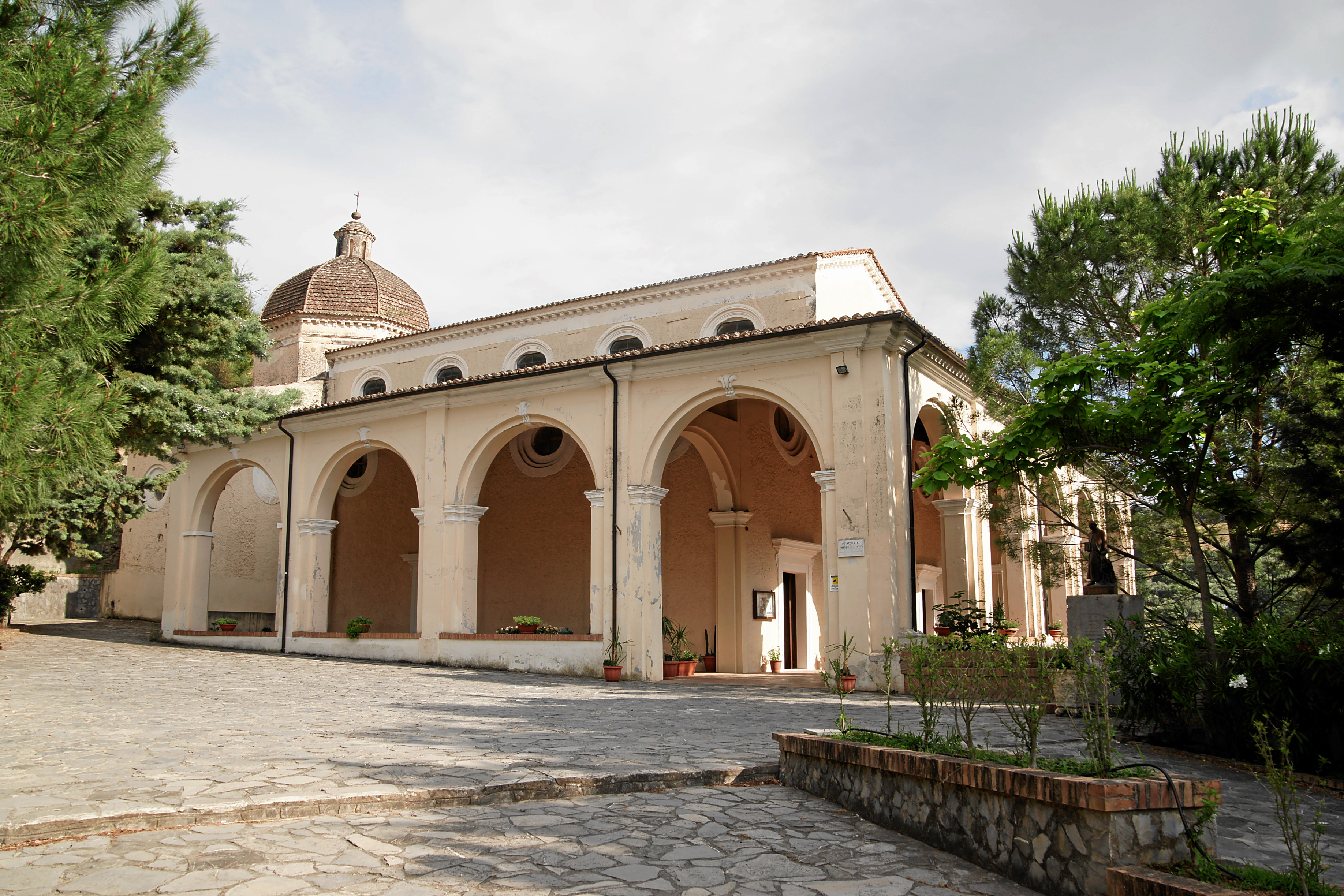 Cassano allo Ionio: Chiesa Madonna della Catena